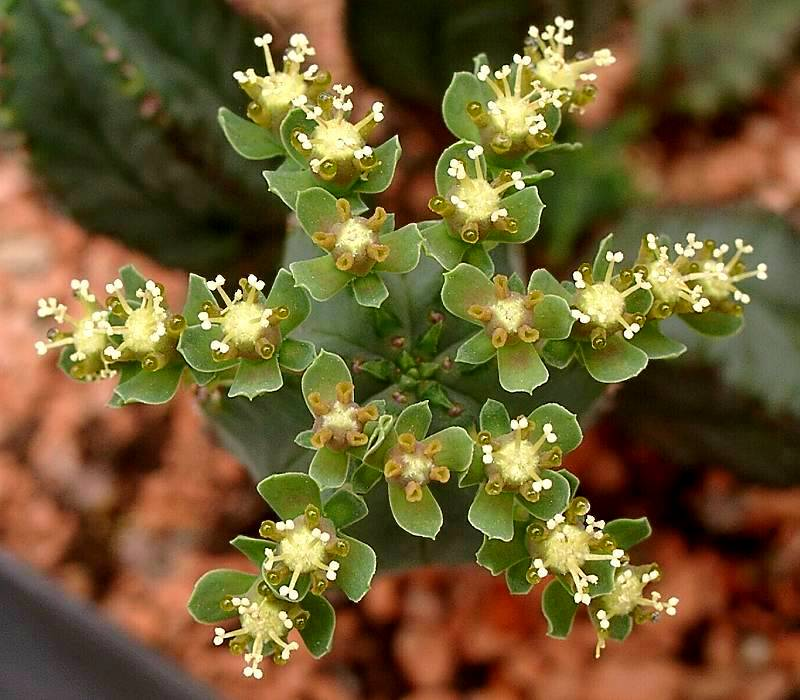 Euphorbia tubiglans